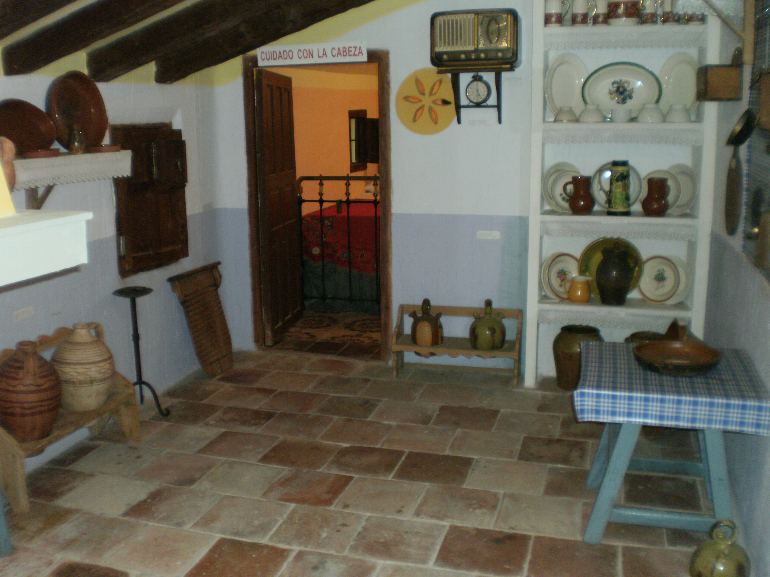 Chillaron de Cuenca herria, Gaztela La Mantxa.